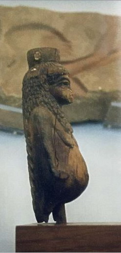 Statue aus Holz, Teje als Göttin Toeris im Ägyptischen Museum Turin, 1998